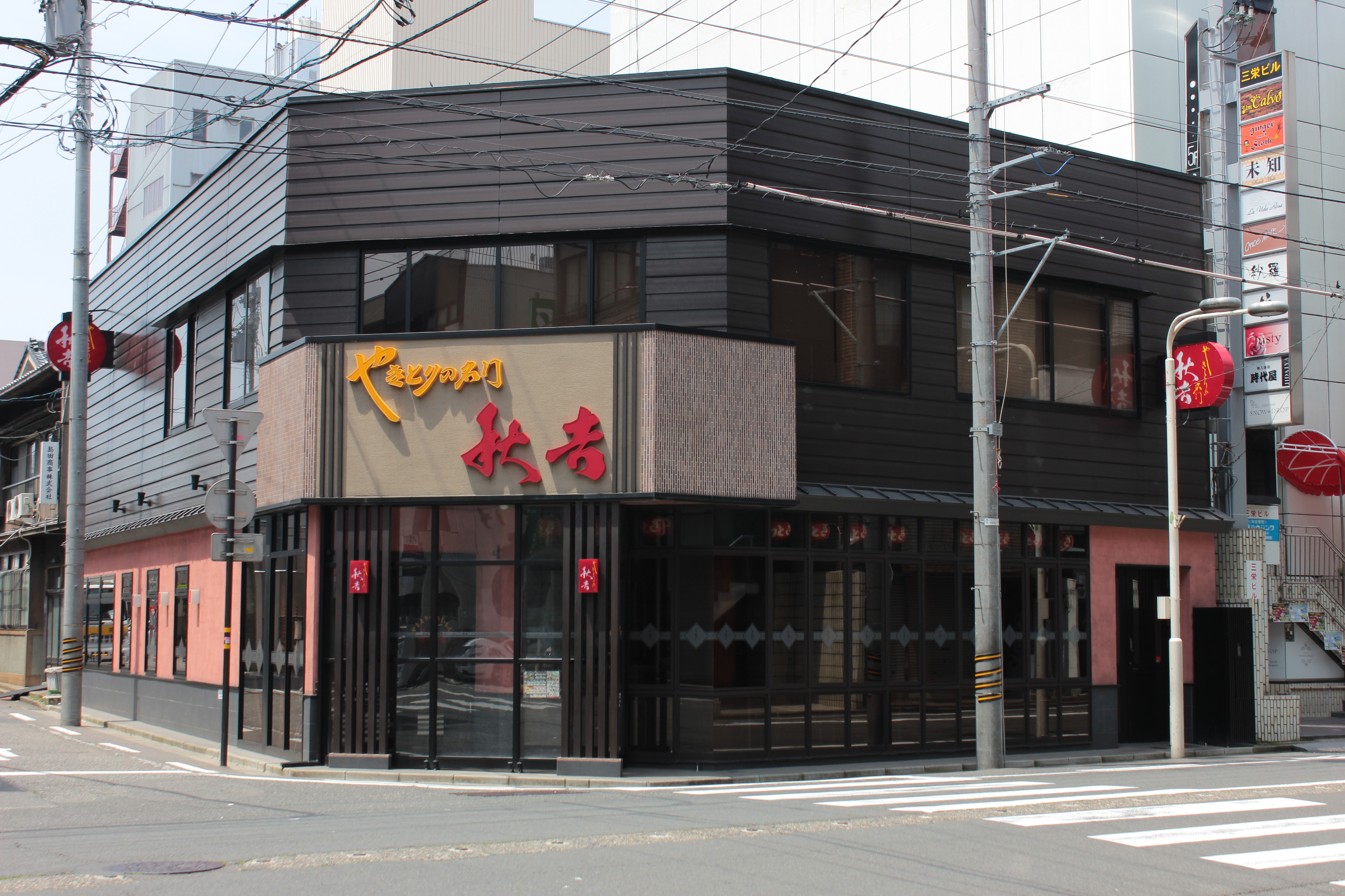 やきとりの名門 秋吉 福井片町店（福井県福井市） Canon EOS Kiss X5